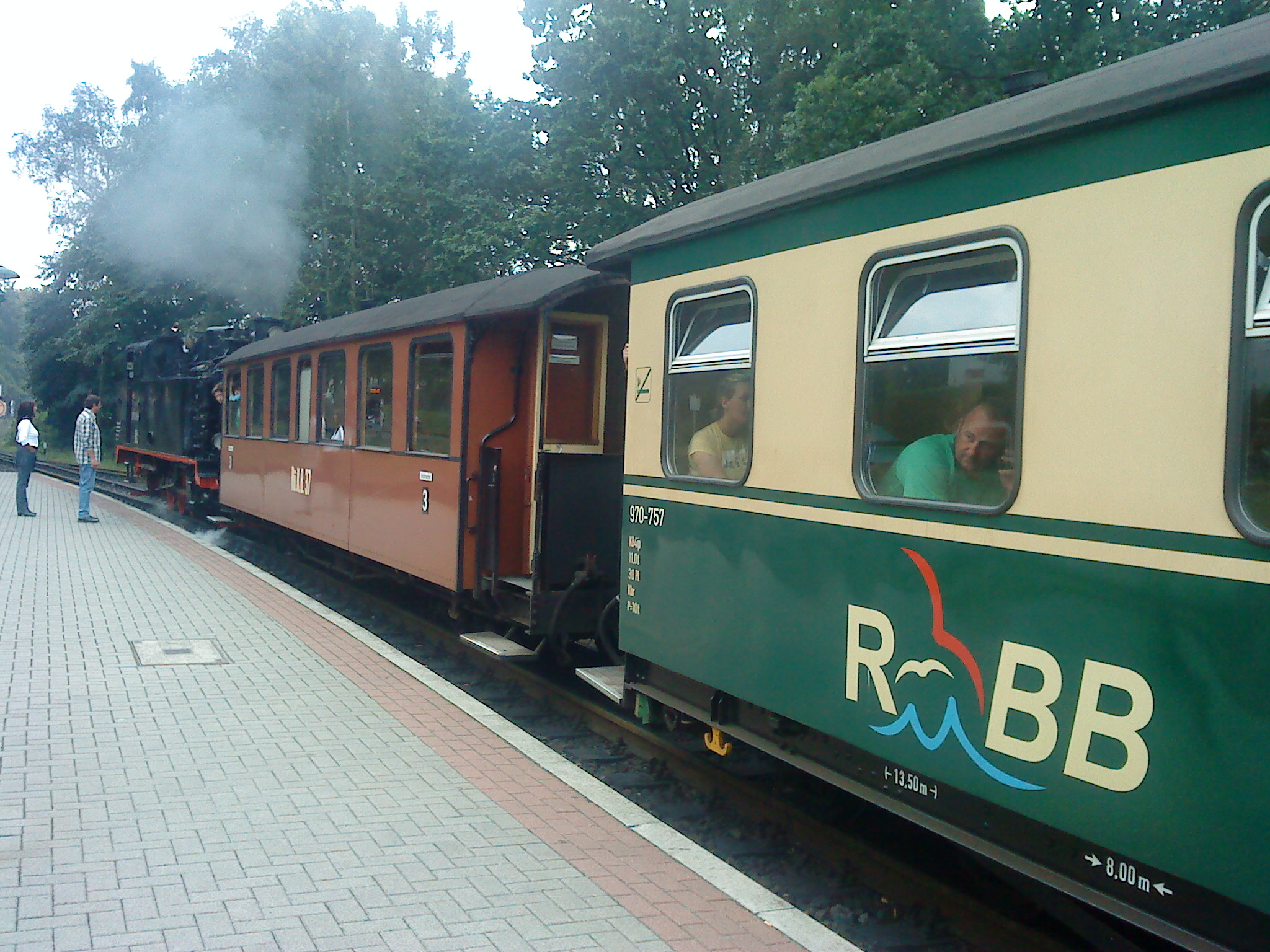 Roland mit originalem und umlackiertem Wagen (2009)